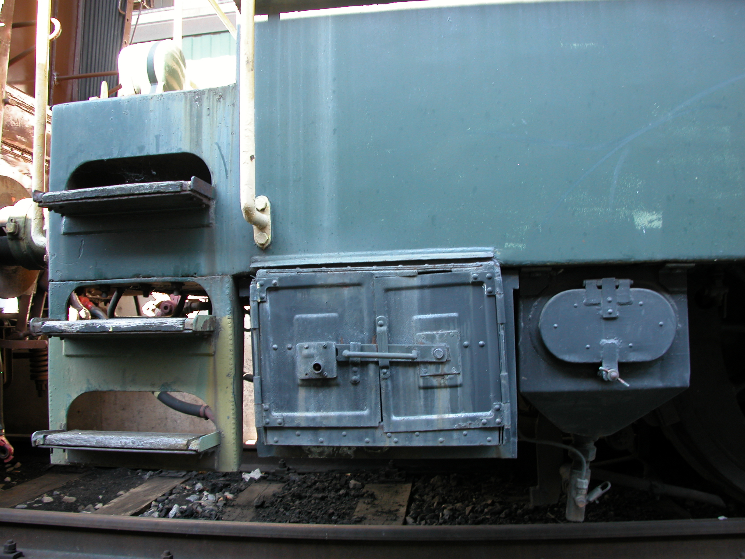 Locomotiva elettrica da manovra FS E.321.003 – Scala d'accesso al praticabile posteriore, alloggiamento accumulatori e sabbiera.